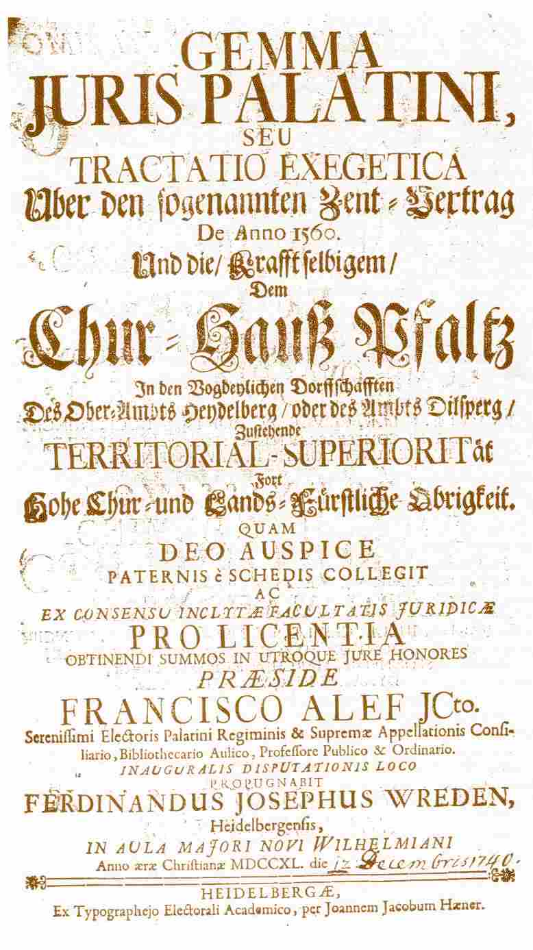 Titelblatt von Gemma Iuris Palatini, Seu Tractatio Exegetica (Zentvertrag der Stüber Zent)